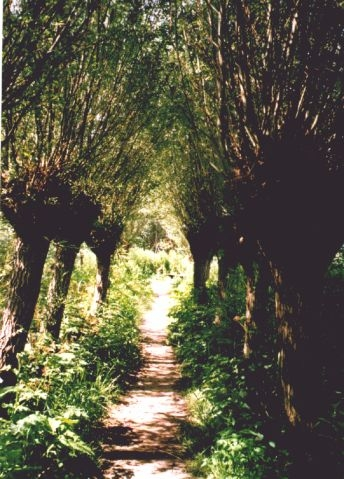 Carnisse Grienden Foto: Vijverln